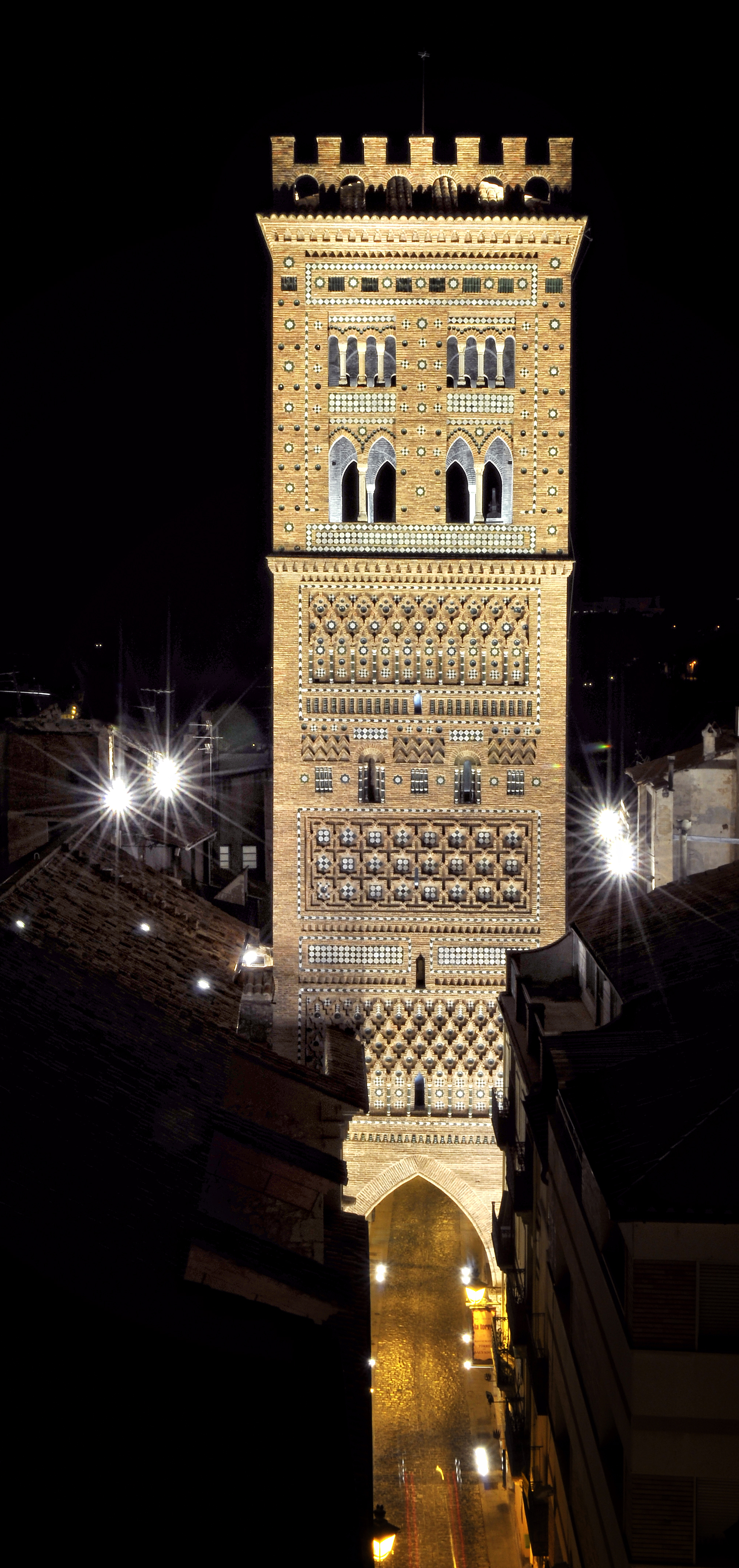 Exterior de la Torre mudéjar de El Salvador de Teruel. Patrimonio Mundial de la Humanidad. Siglo XIV